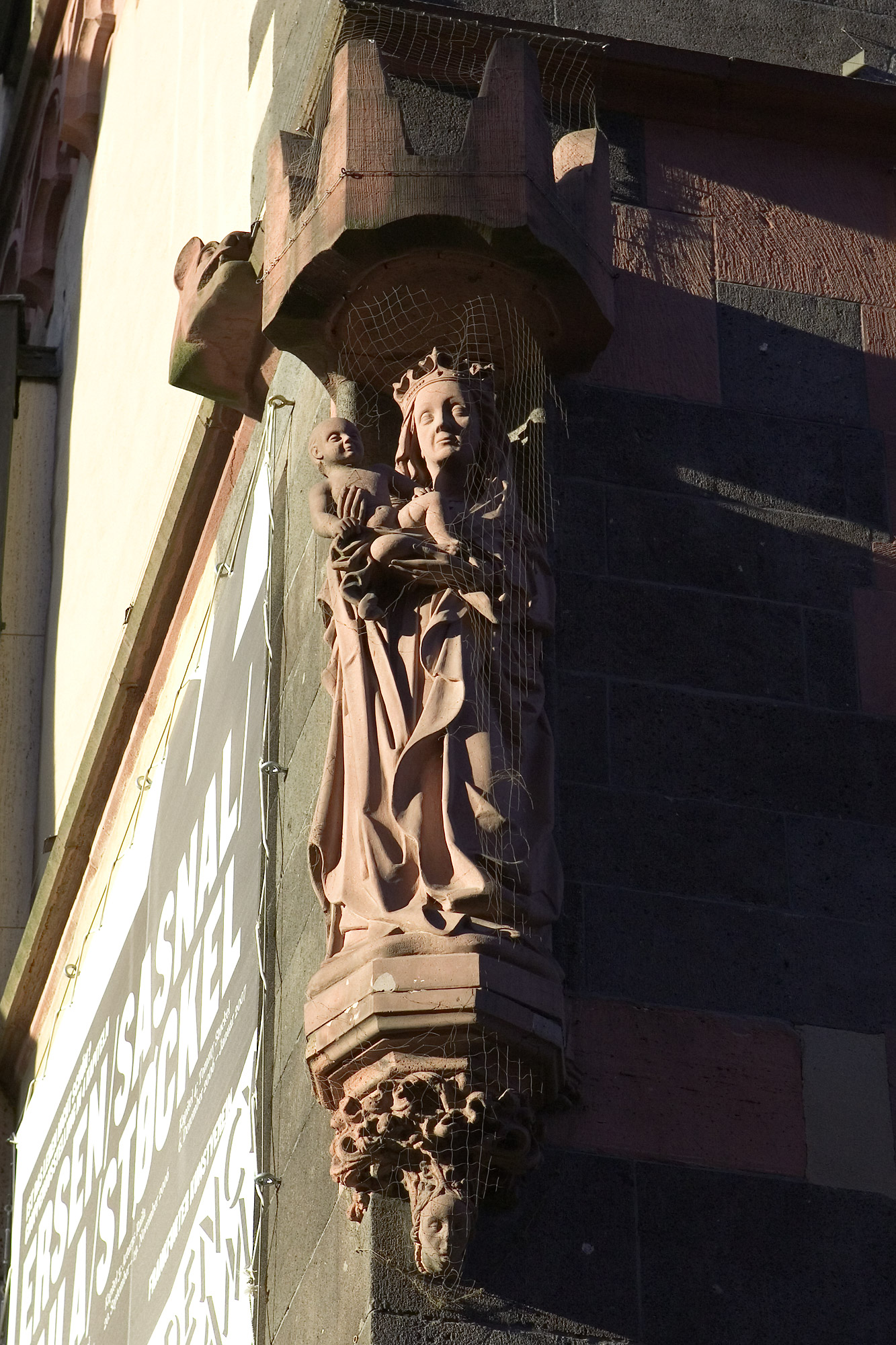 Baldachin mit Marienfigur am Steinernen Haus in Frankfurt am Main. Selber fotografiert im Oktober 2006, daher gemeinfrei.